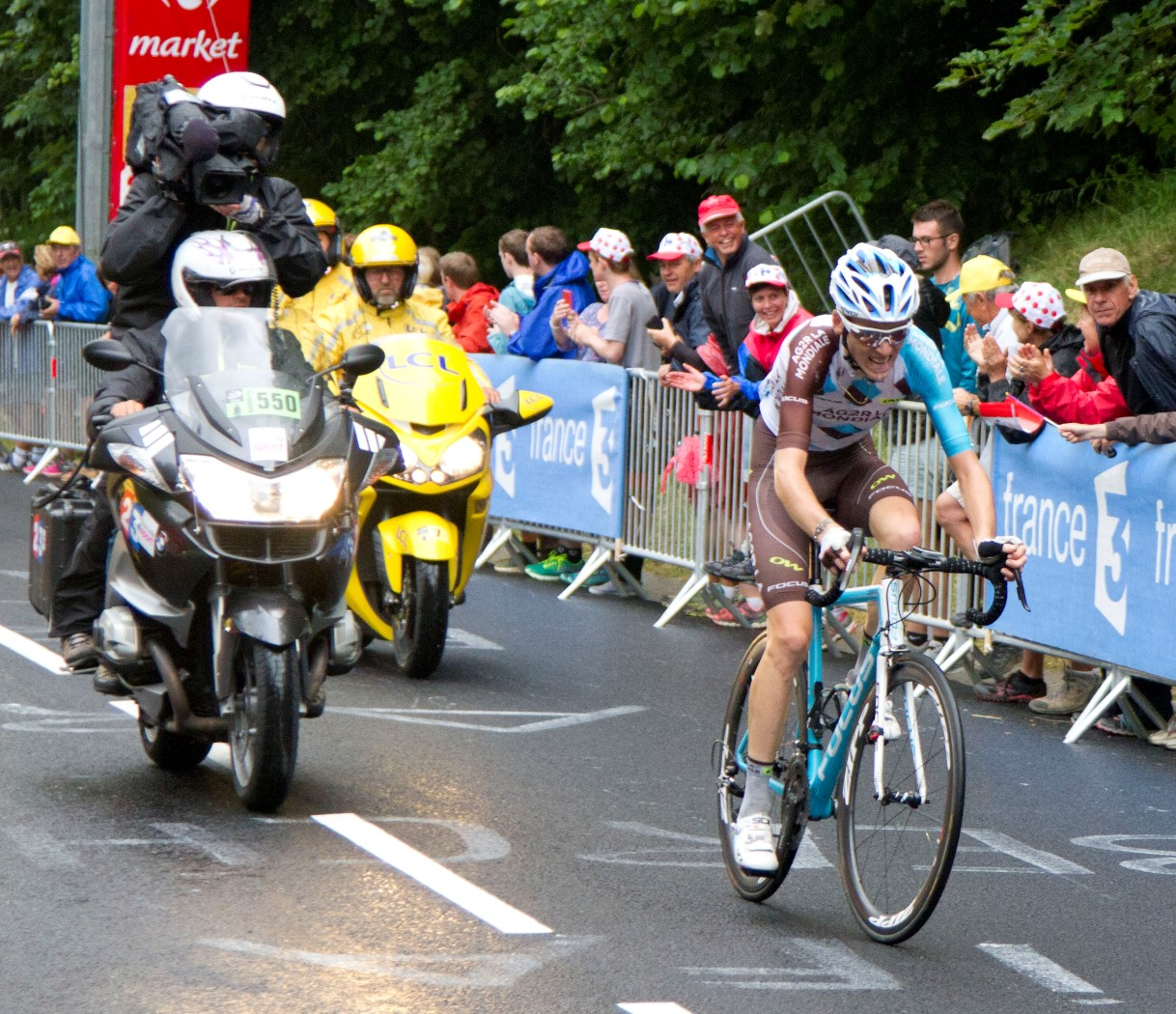 9011 bardet